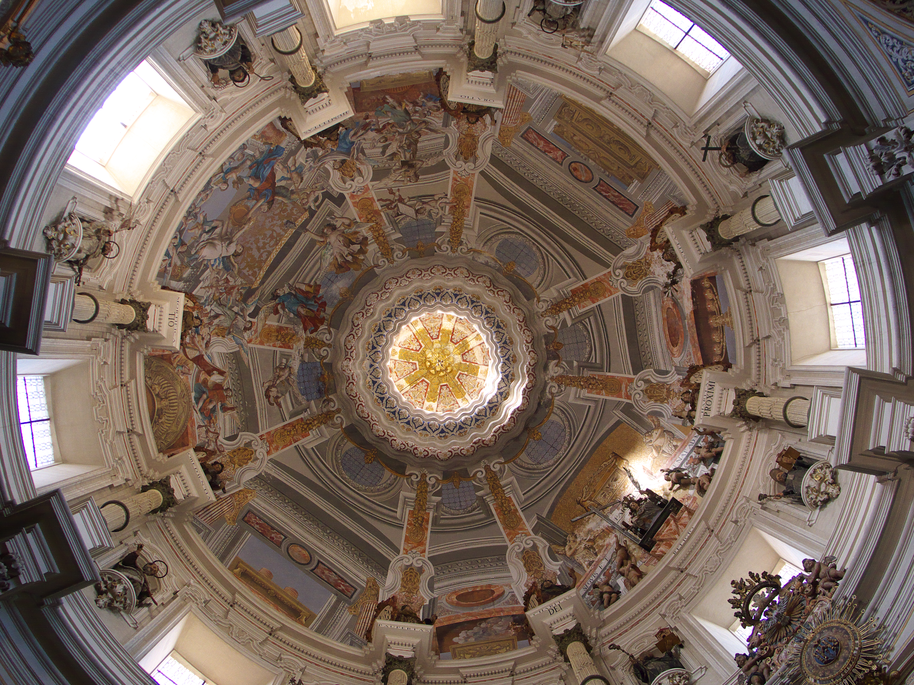 La "gloria celestial" en la simbología de la Compañía de Jesús, según el modelo idílico del Templo de Salomón. Iglesia de San Luis de los Franceses, Sevilla, España